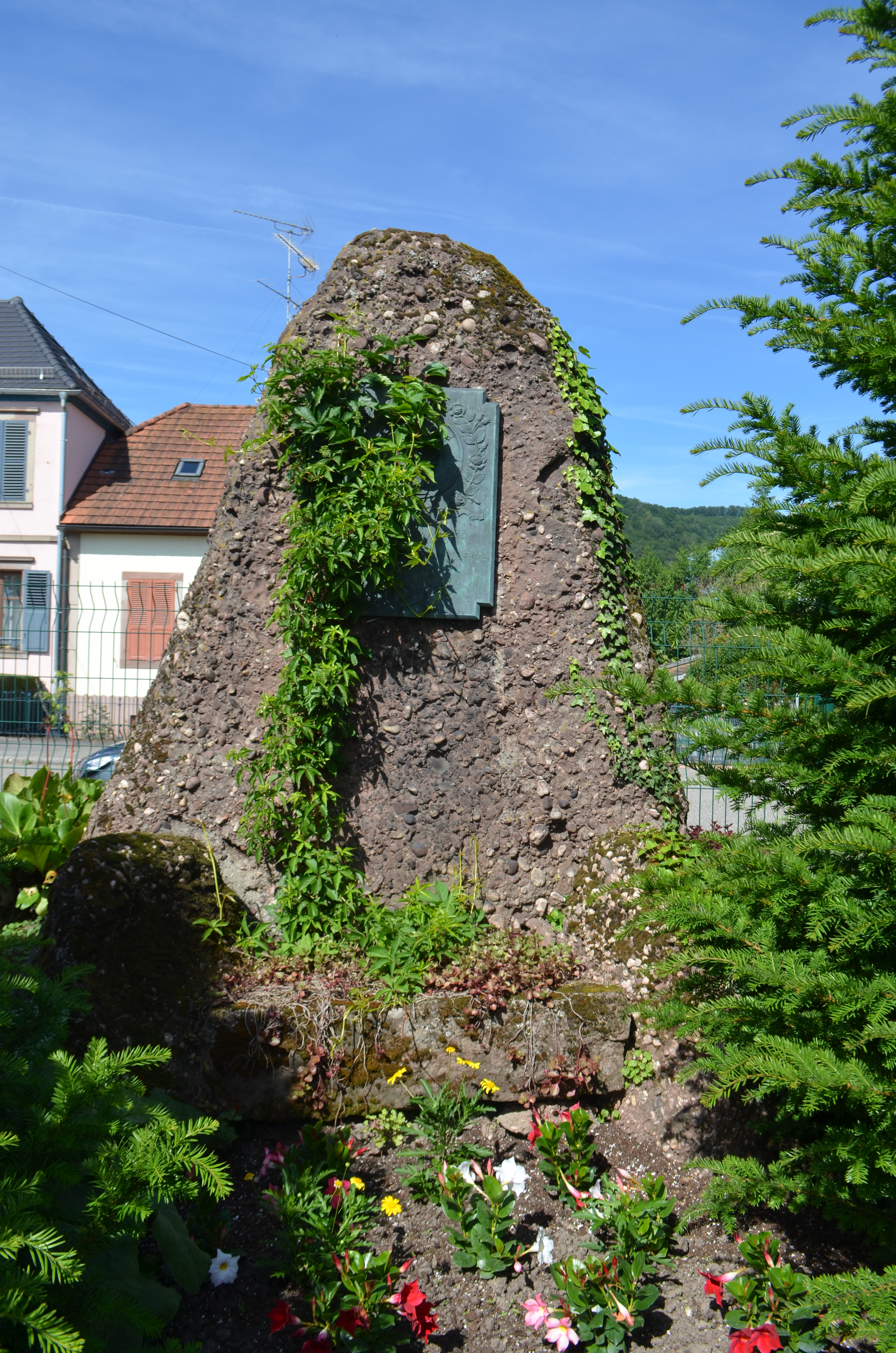 Saverne, Roseraie, monument commémoratif Louis Walter